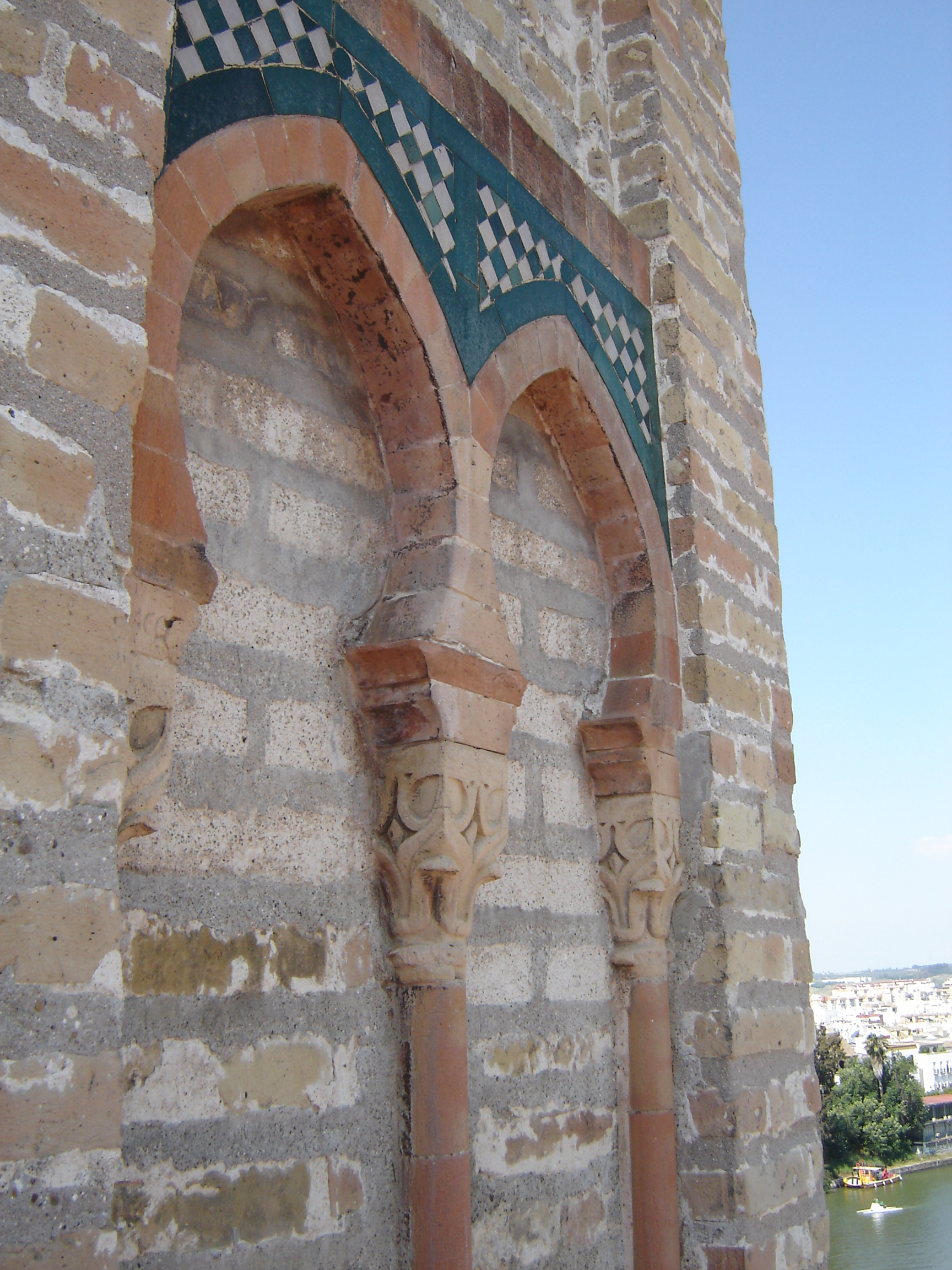 Torre del Oro (Sevilla). Detalle del segundo cuerpo.